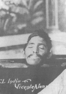 Cabeza de Vicente "El indio" Alonso Teodoro, luego de su ejecucion.